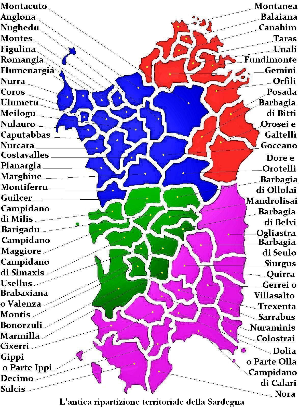 Sardinians curatorie